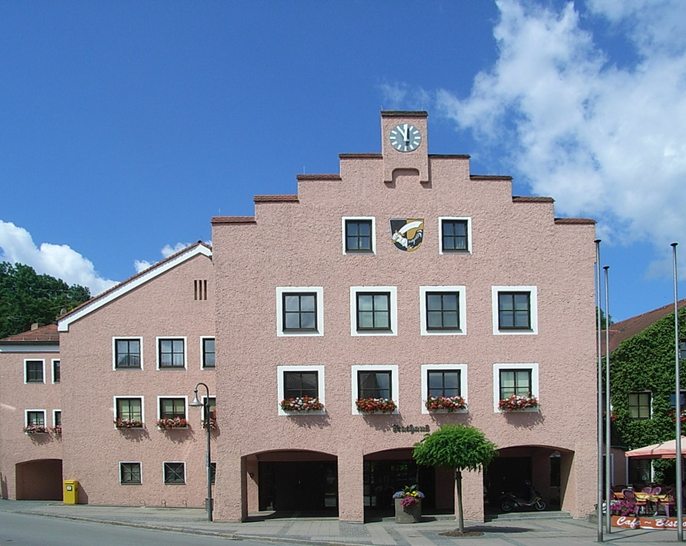 Das Rathaus von Arnstorf, Niederbayern